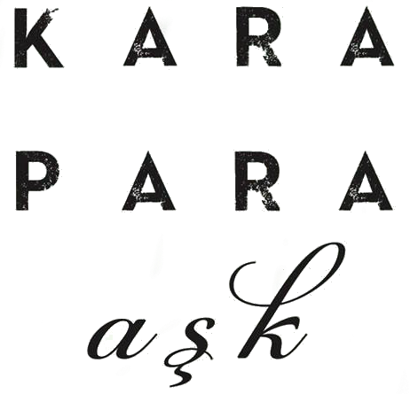 Logo de la serie de televisión Kara Para Aşk